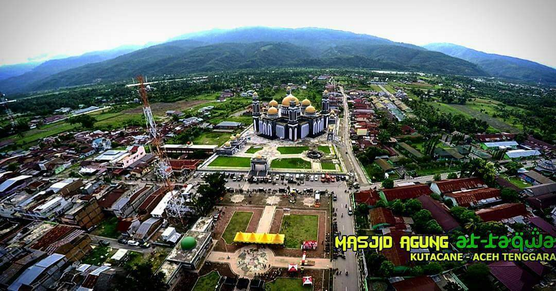 Masjid megah dari lembah Alas